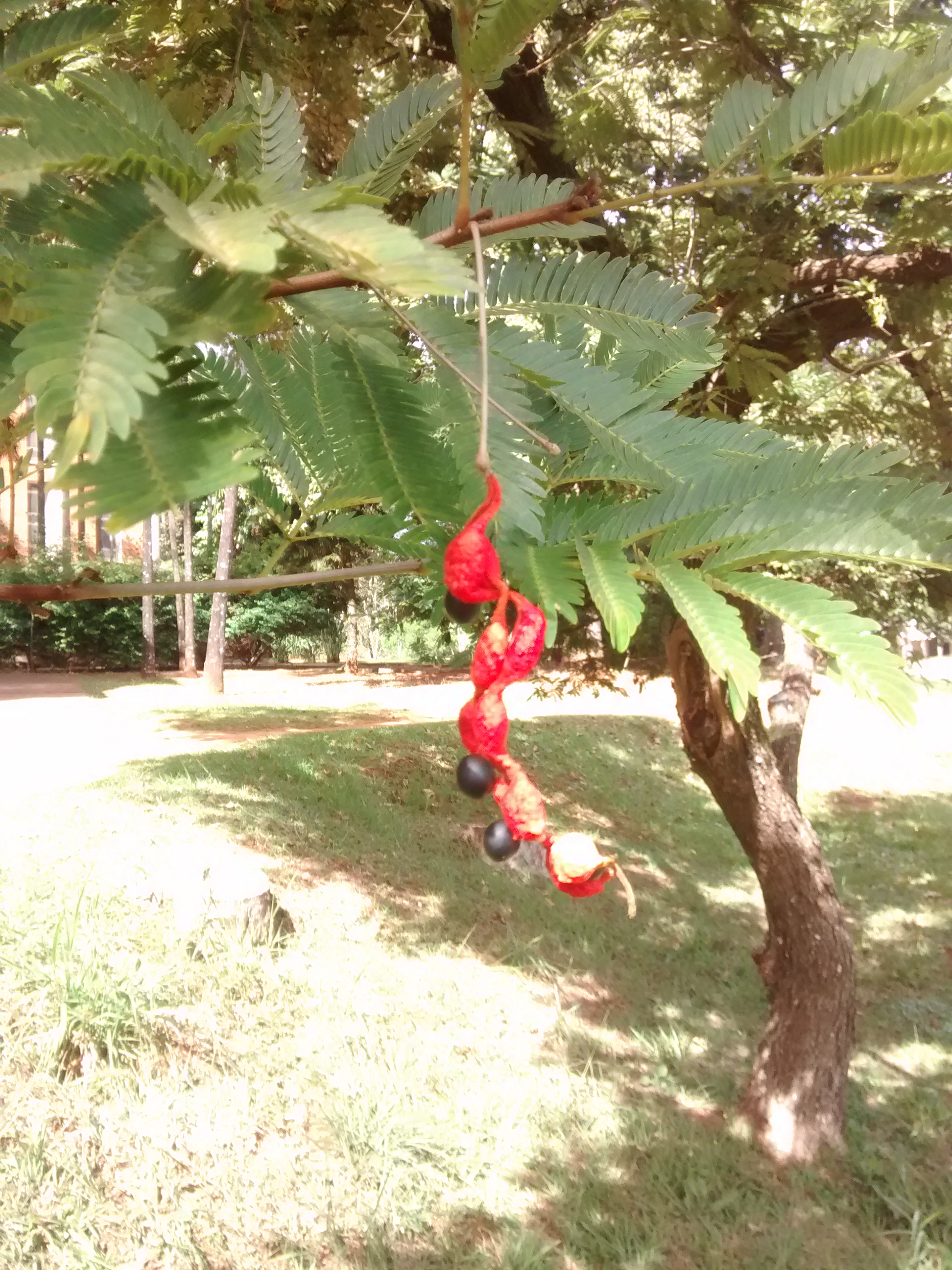 Fruto e folhas em detalhe na frente da FE - unicamp.